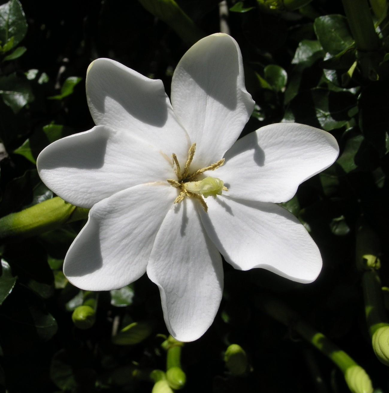 Wild Gardenia, Forest Gardenia, White Gardenia (Gardenia thunbergia)